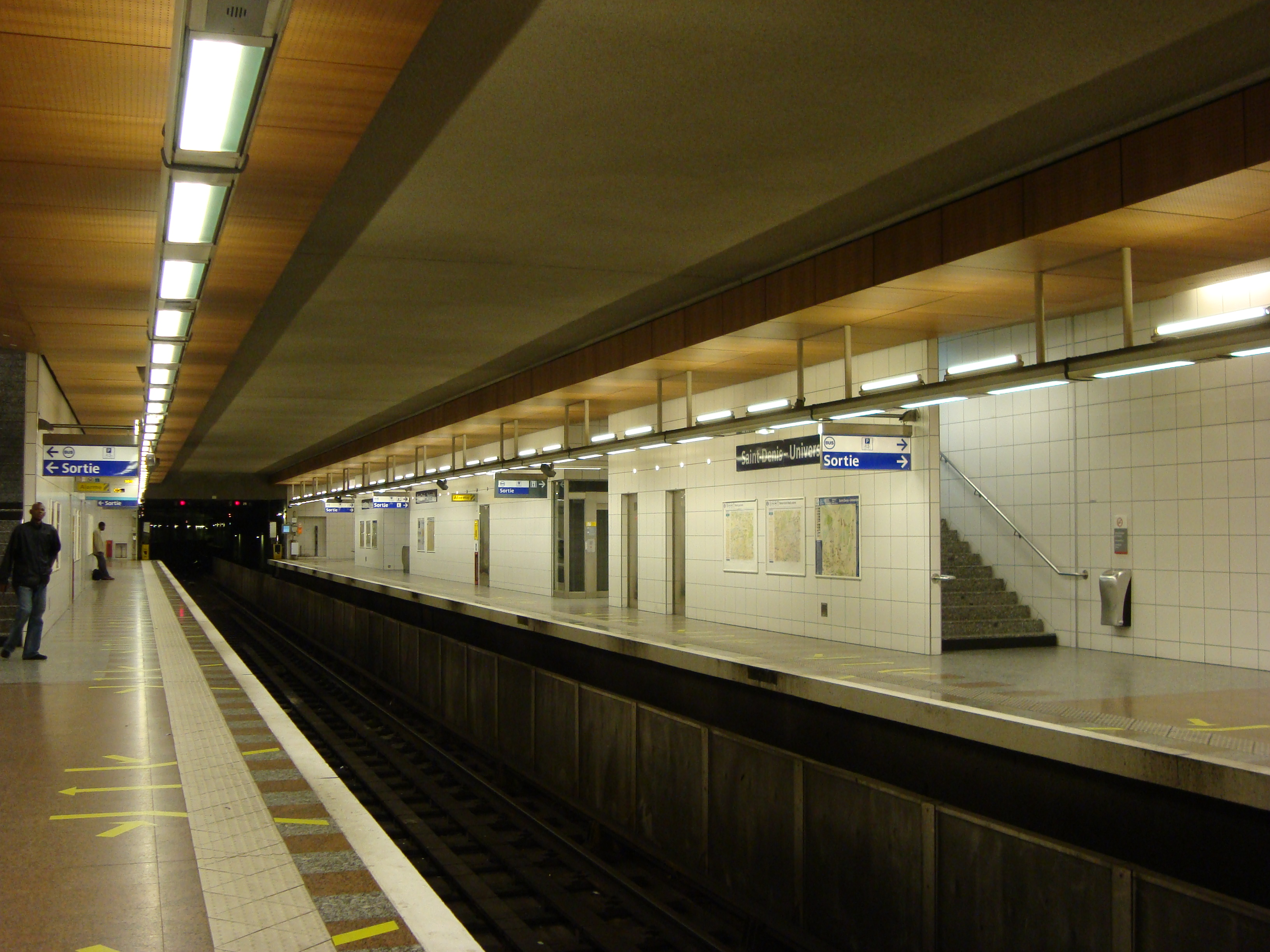 Quais voyageurs du terminus de la ligne 13 du métro parisien à la station Saint-Denis Université.